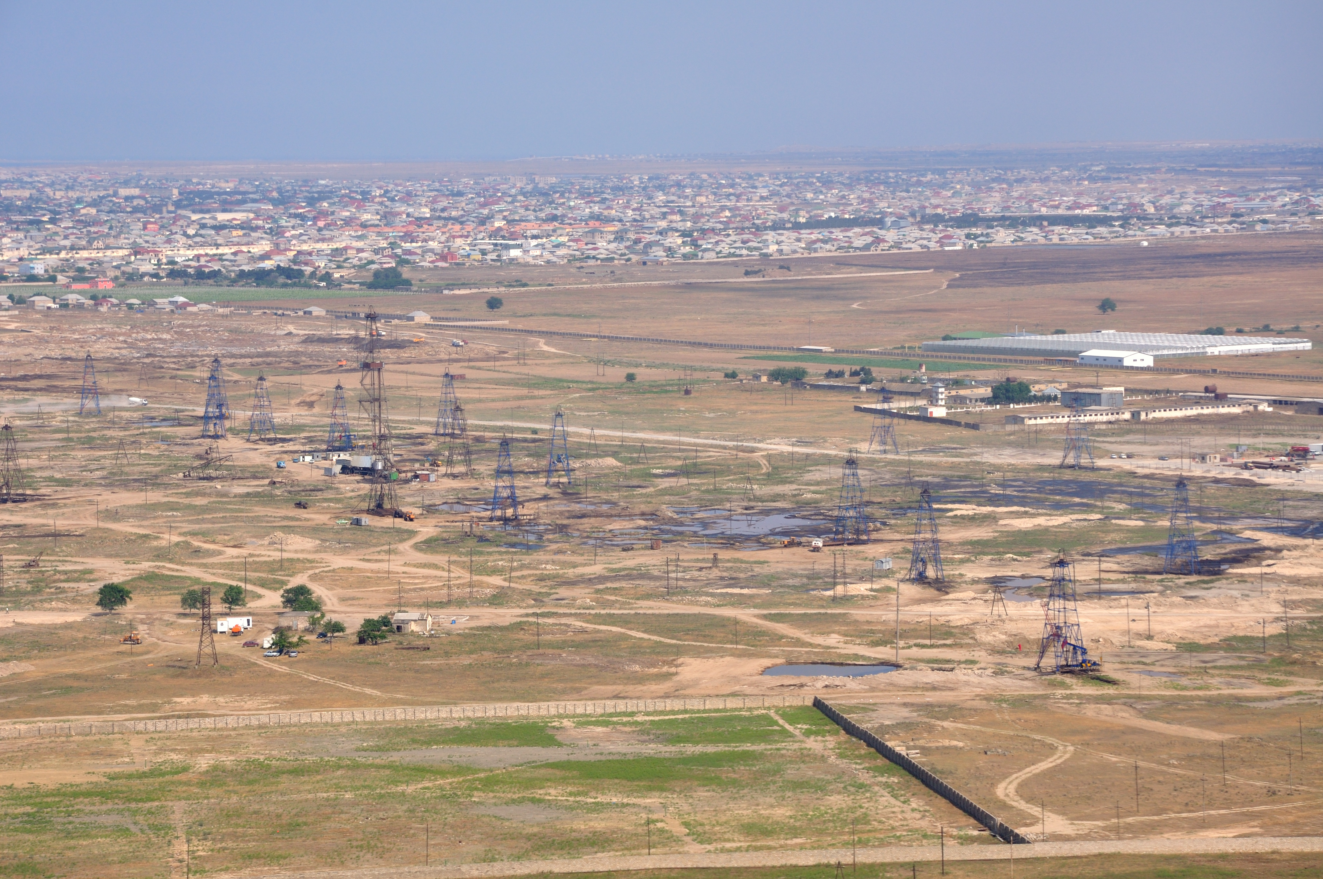 Azerbaijan, approach into Baku